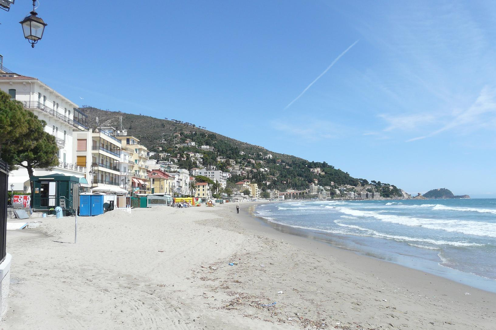 Alassio, Liguria, Italia